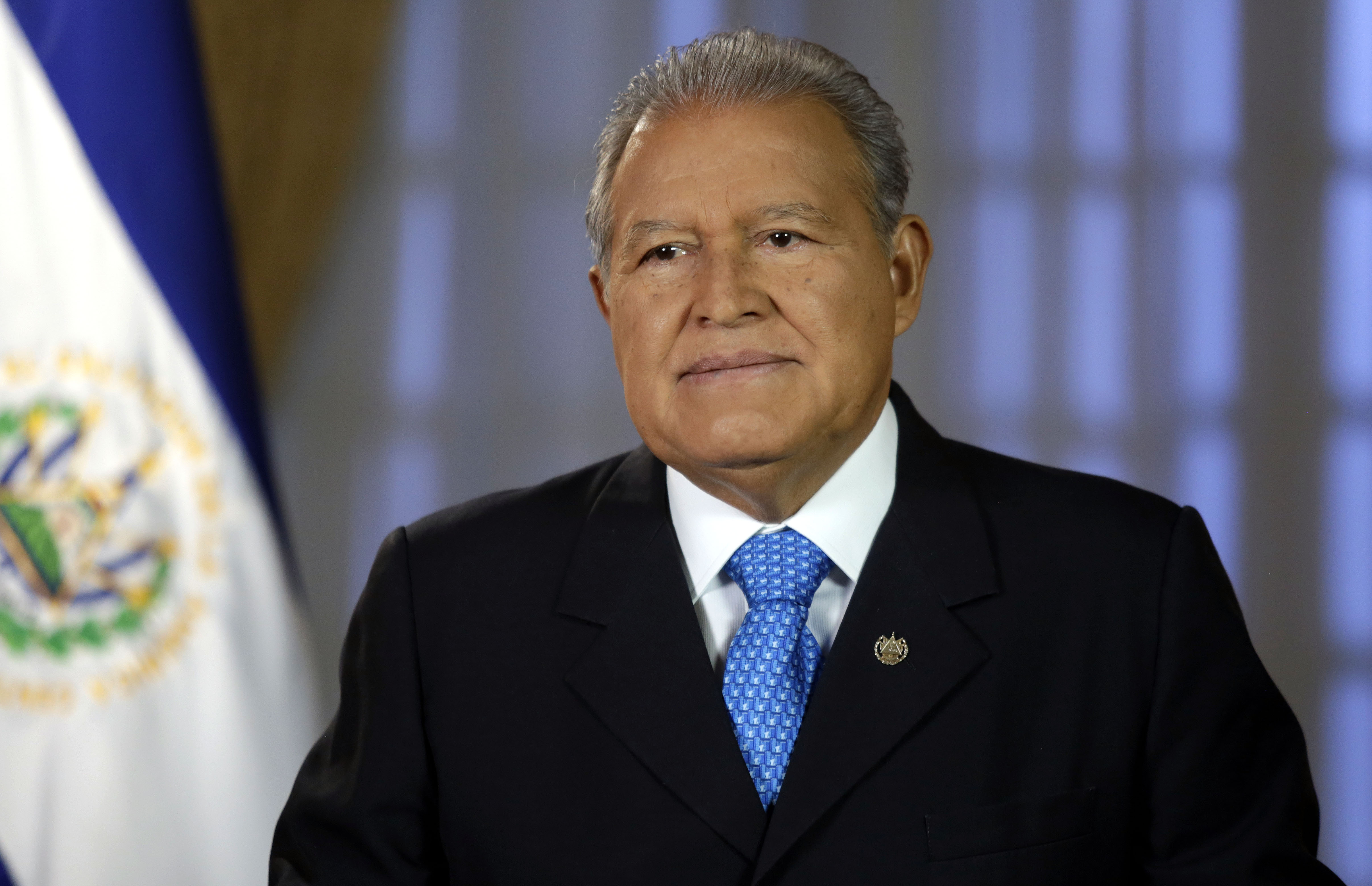 Cadena Nacional 03